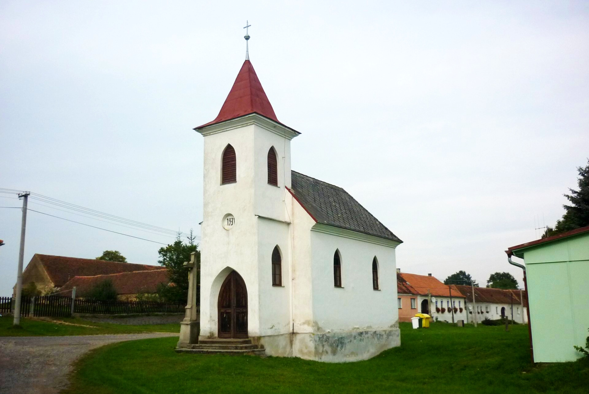 Hluboká - kaplička